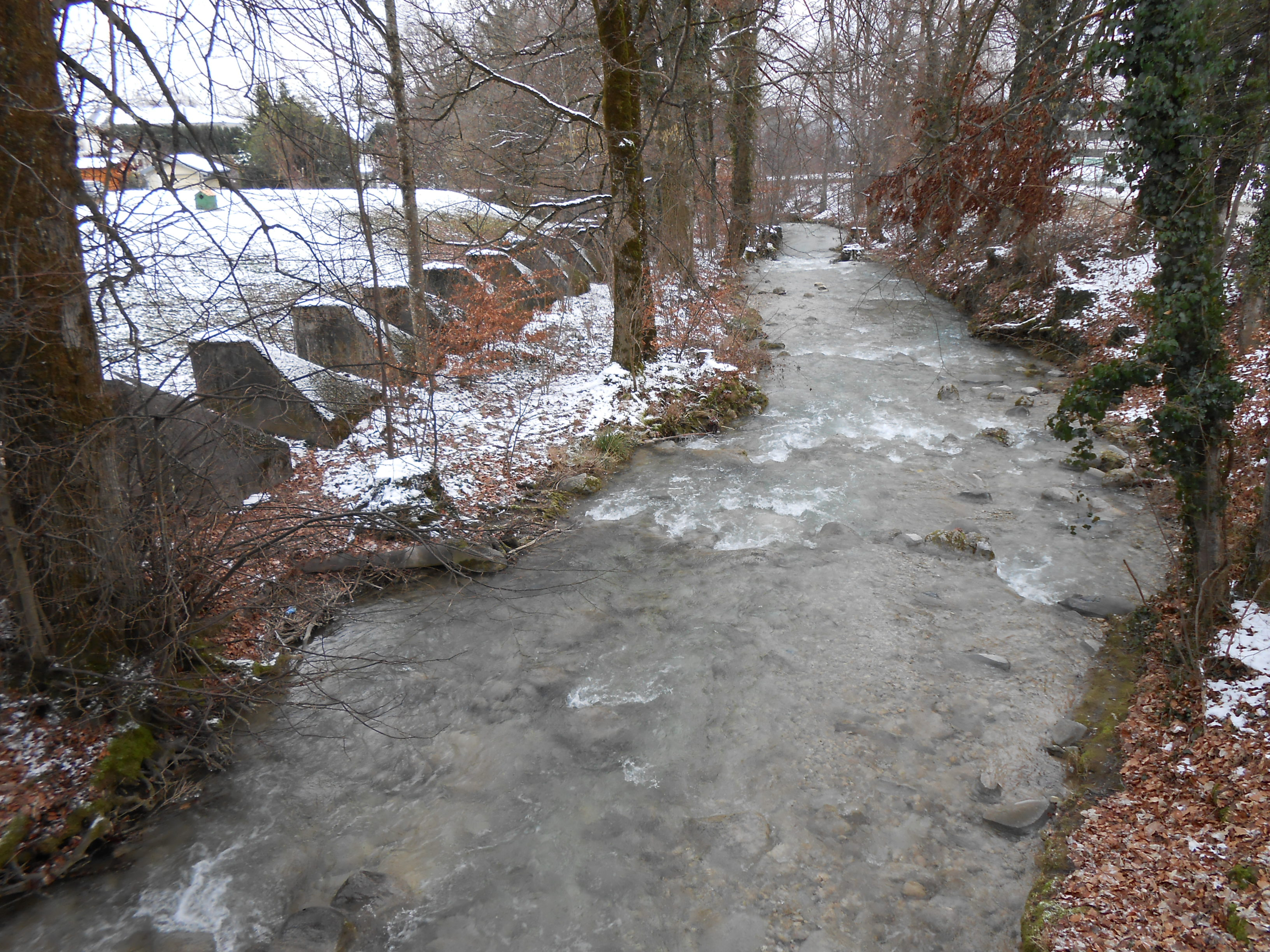 Le sentier des Toblerones le long de la Serine à Vich, Suisse.